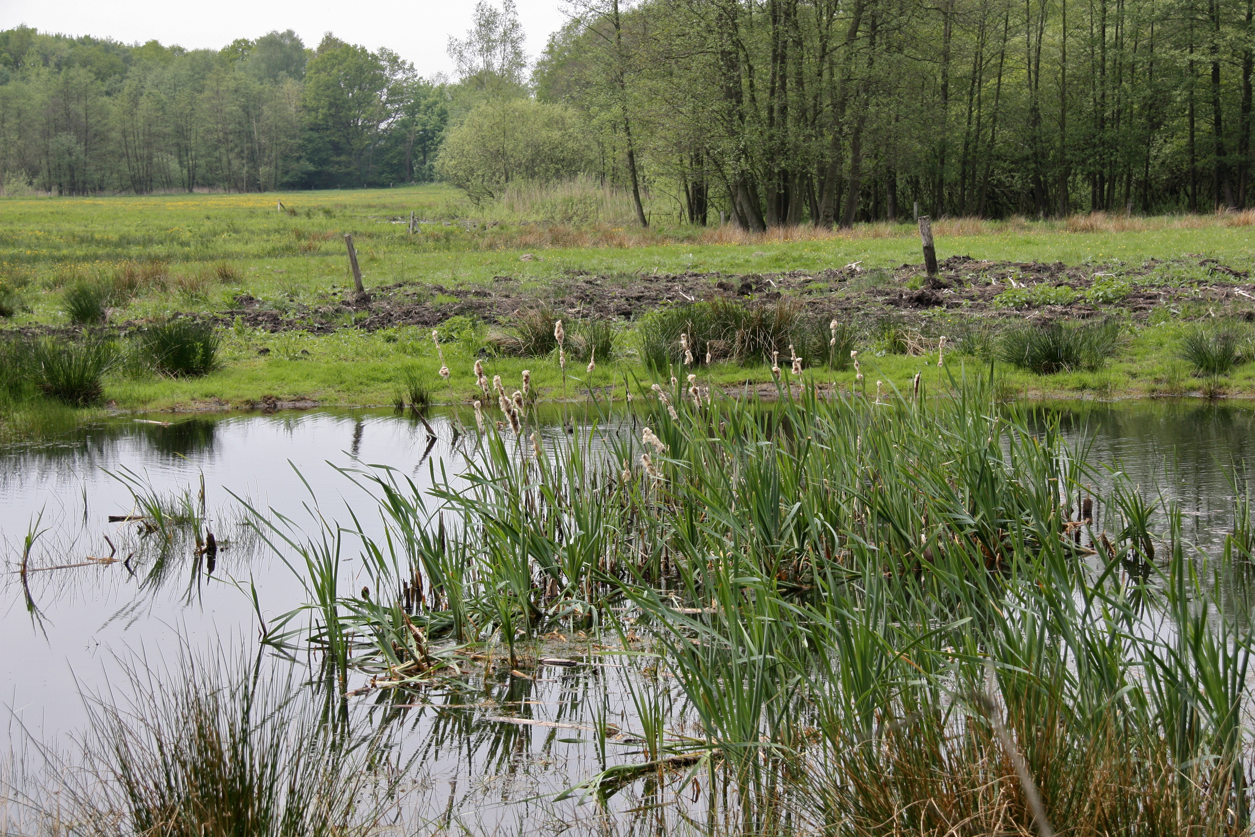 Hamburg, Rahlstedt, Stellmoorer Tunneltal, Tümpel